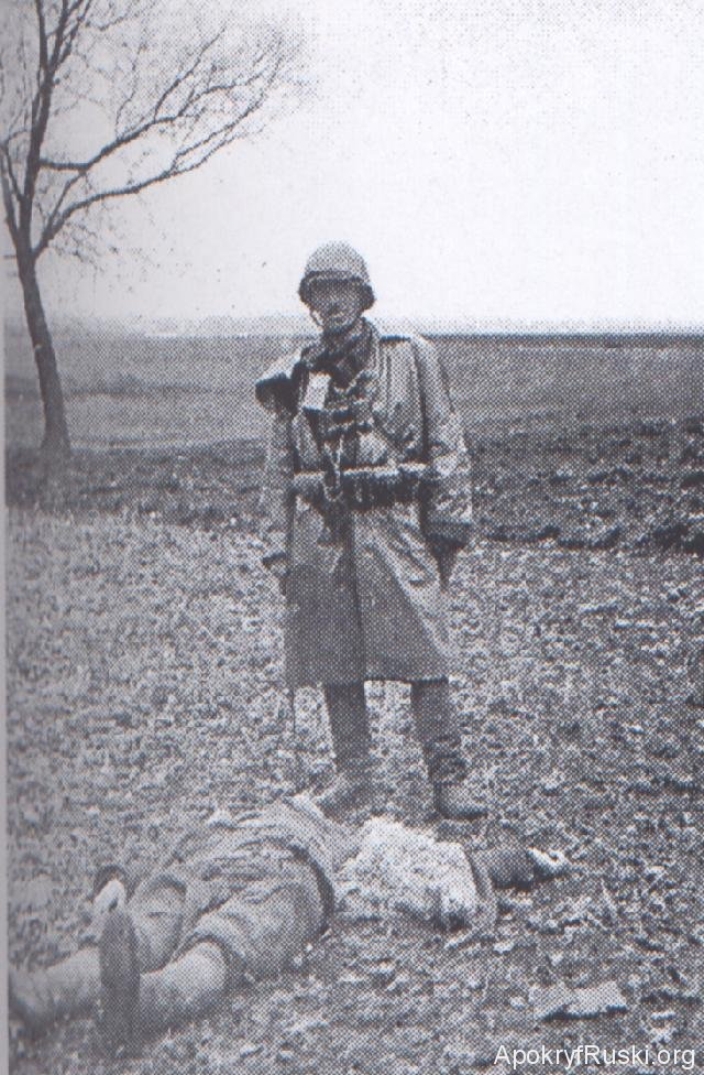 Бойовик армії Kрайової посміхається над трупом українського селянина, який був убитий в полі поблизу с.Сагринь